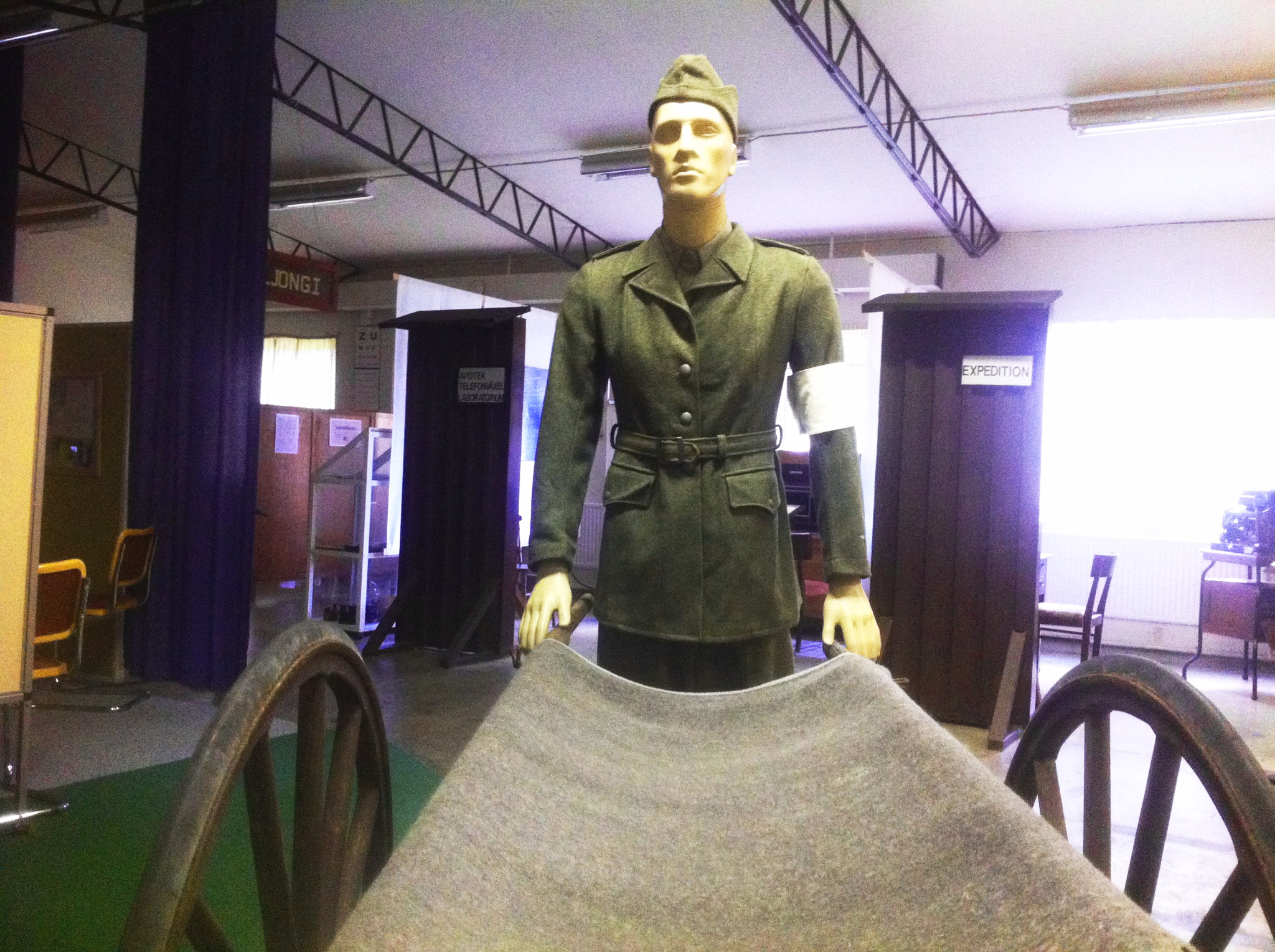 Lärbro krigssjukhus, (Sjukvårdsmuseum). Gotland, Lärbo